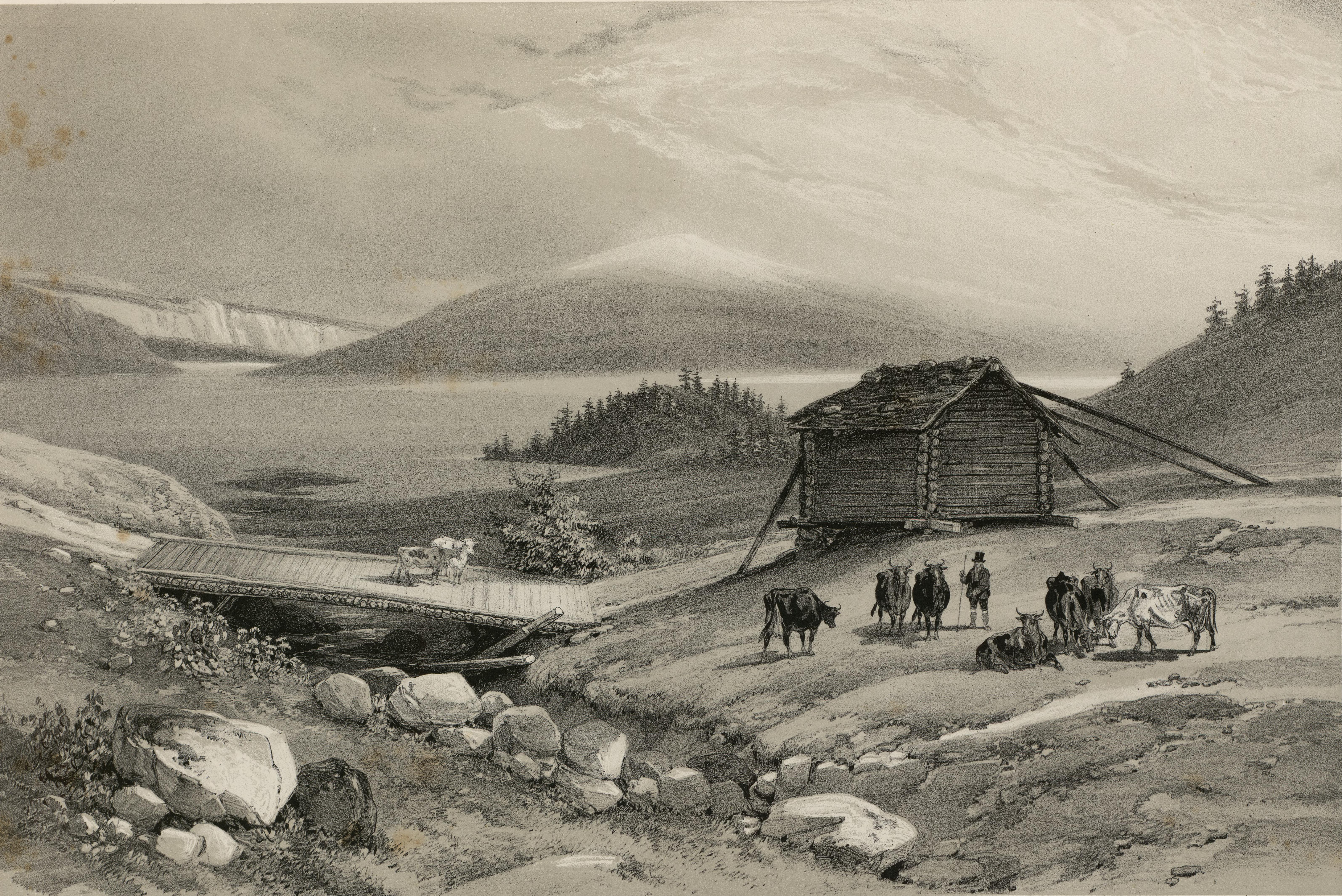 Illustrasjon hentet fra boken "Voyages de la Commission scientifique du Nord, en Scandinavie, en Laponie, au Spitzberg et aux Feröe" av ukjent forfatter og utgitt av Arthus BertrandParis : Arthus Bertrand, [1852] (Paris, [1852])